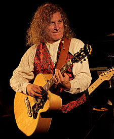 David Arkenstone compositor e intérprete del género New Age